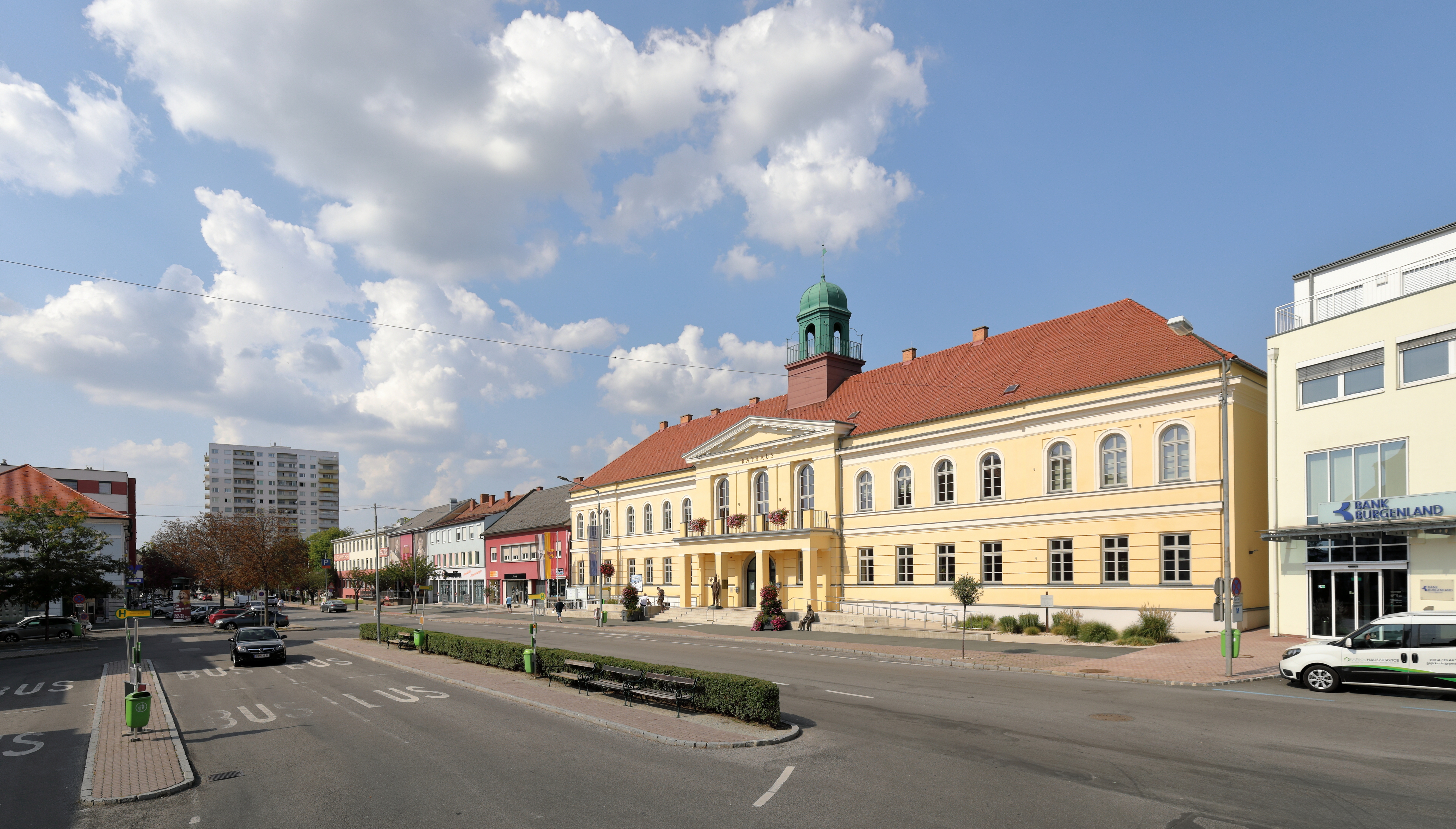 Ortszentrum der burgenländischen Bezirkshauptstadt Oberwart mit dem 1949 errichteten Rathaus im Vordergrund.